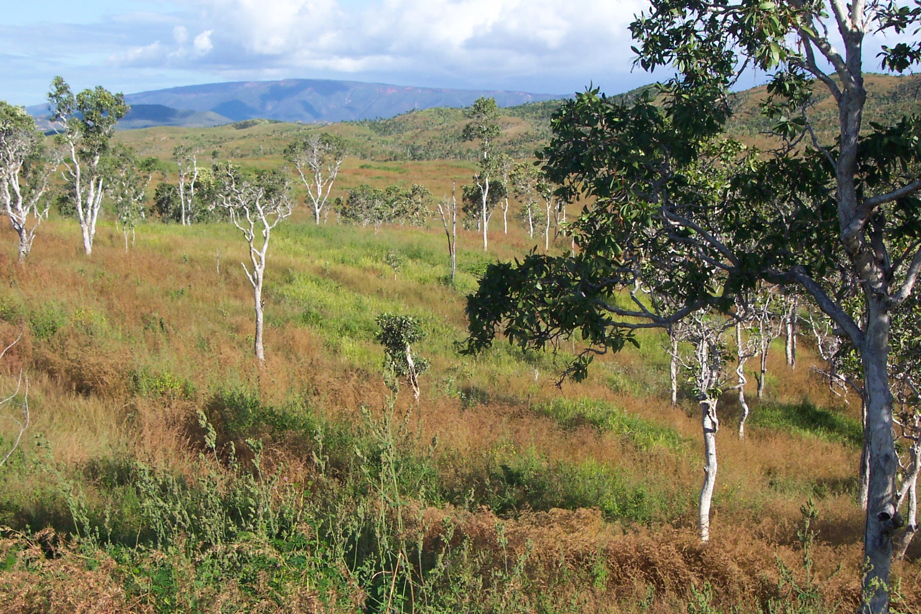 Paysage de brousse à Poum nord de la Nouvelle-Calédonie